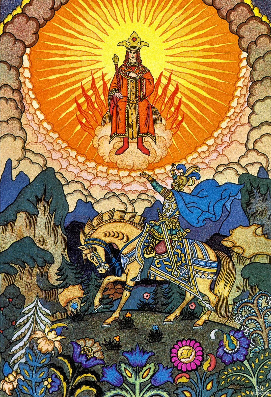 Сказка о царе Салтане